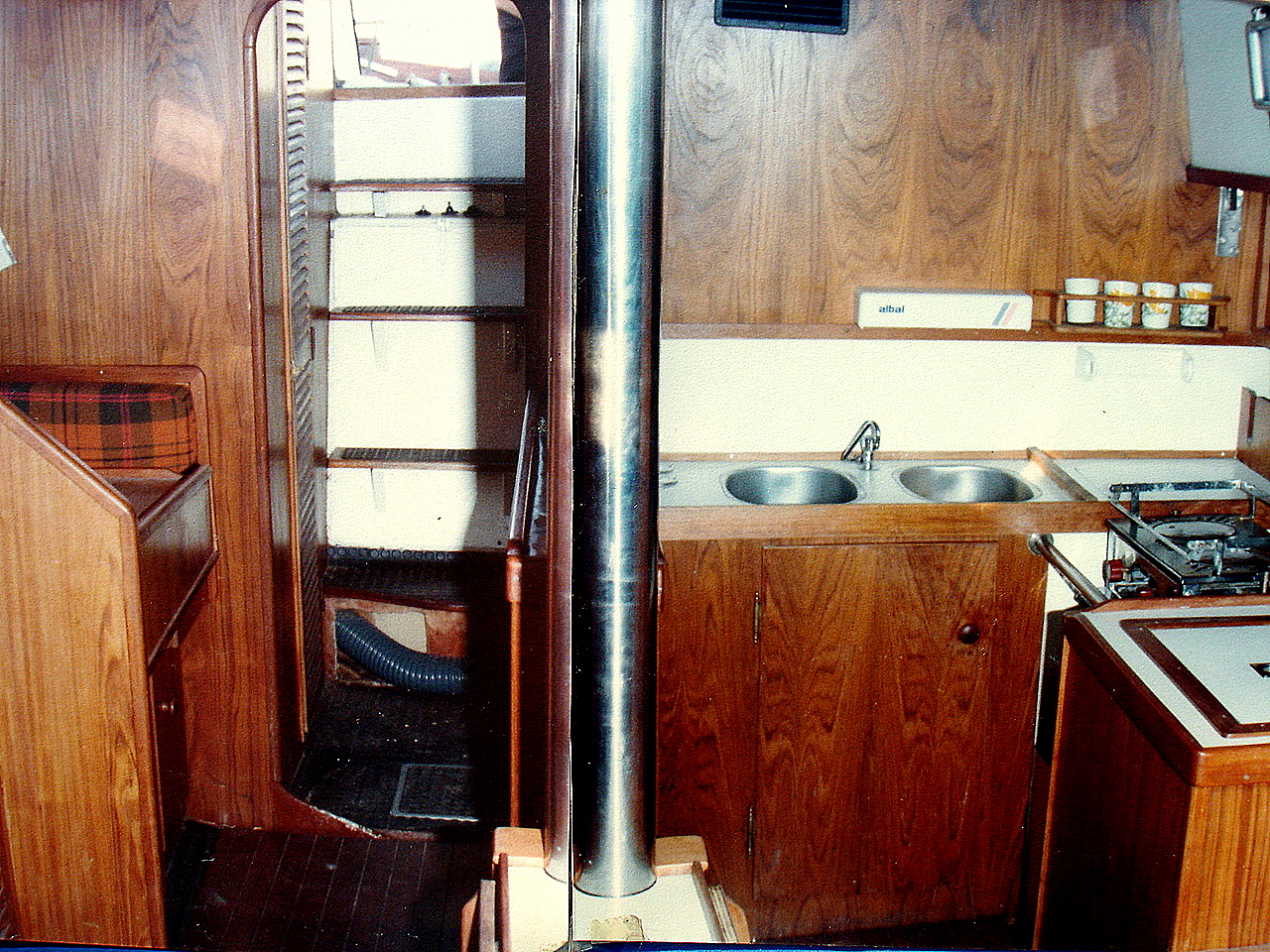 épontille de mât